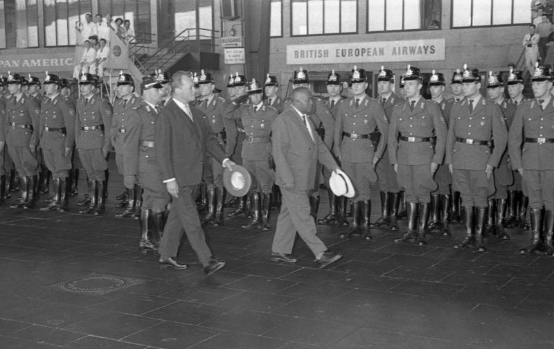 Staatsbesuch Madagaskar: Ankunft Berlin-Tempelhof Begrüßung durch Bürgermeister Brandt